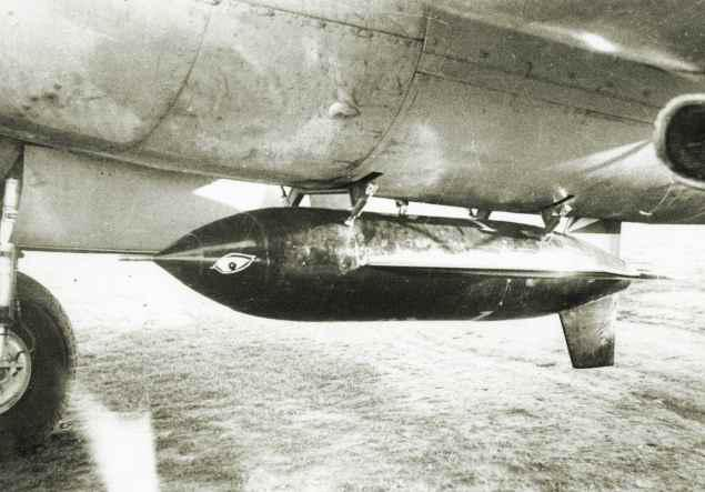 Anclaje ventral del Aeromóvil AM-1 Tábano en el bombardero I.Ae.24 Calquín